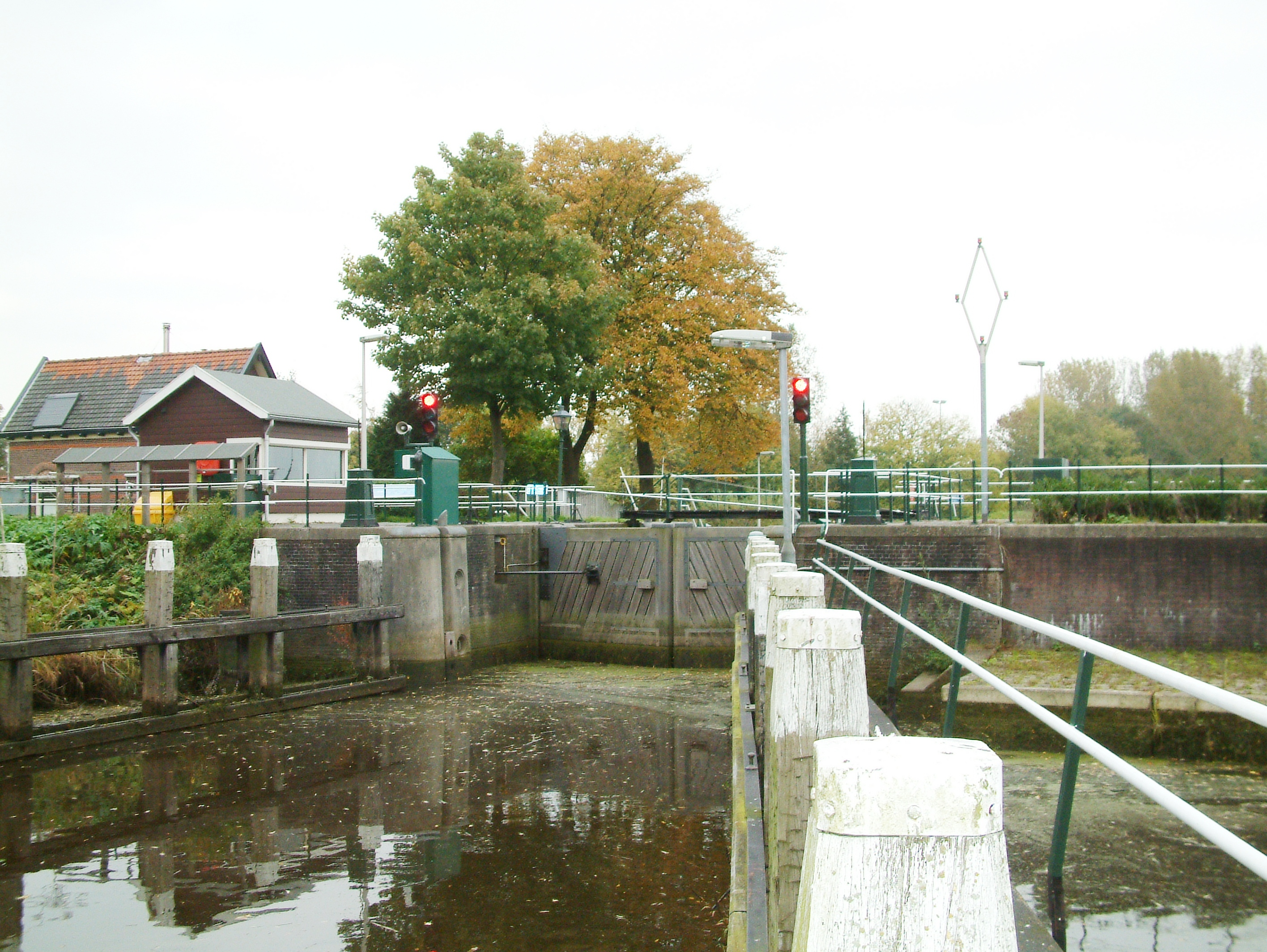 De Waaierssluis in Gouda